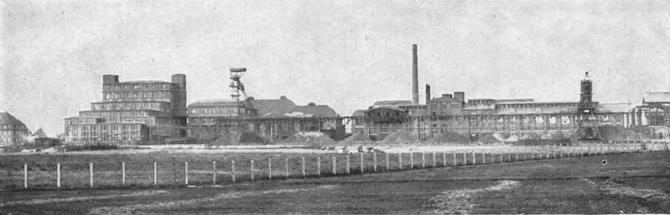 Kopalnia rud cynku i ołowiu Deutsch-Bleischarley w Bytomiu (zdjęcie ze strony 86).